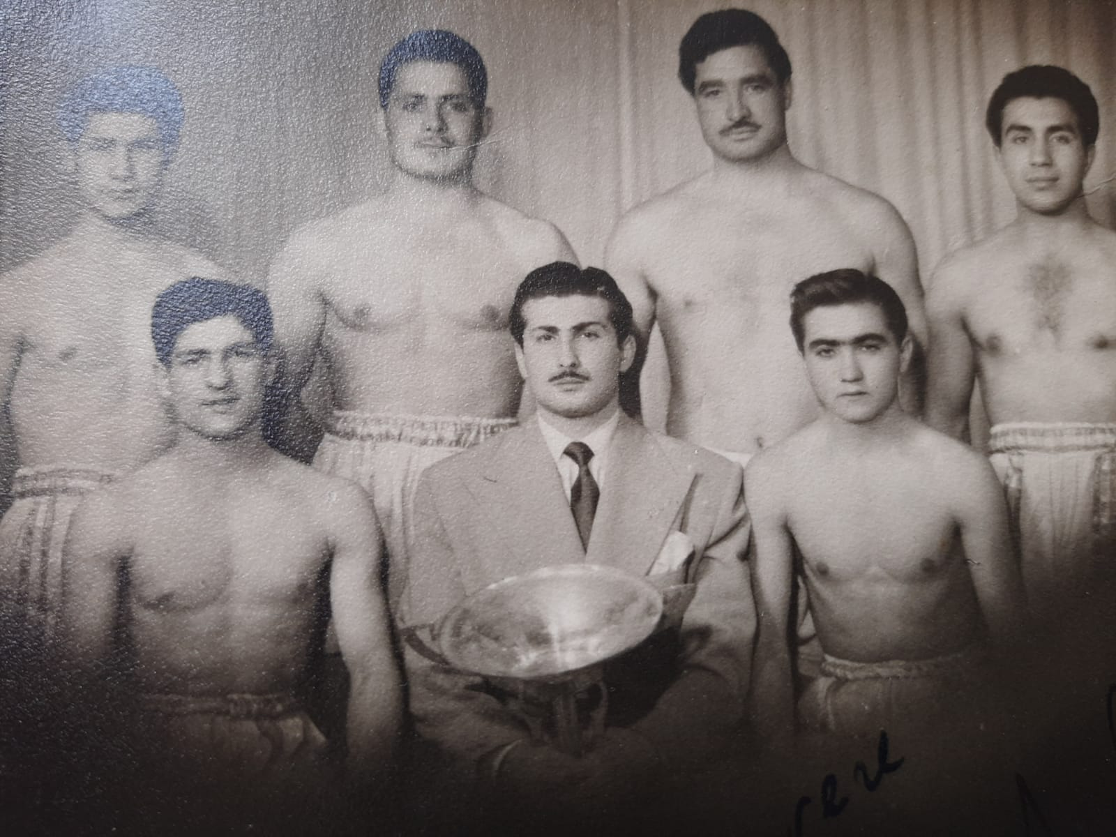 Galatasaray Forması Altında Türkiye Şampiyonluğu